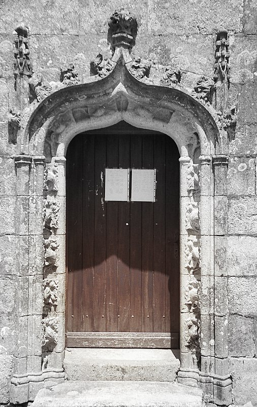 église de la Feuillée, porche, denez goasguen.